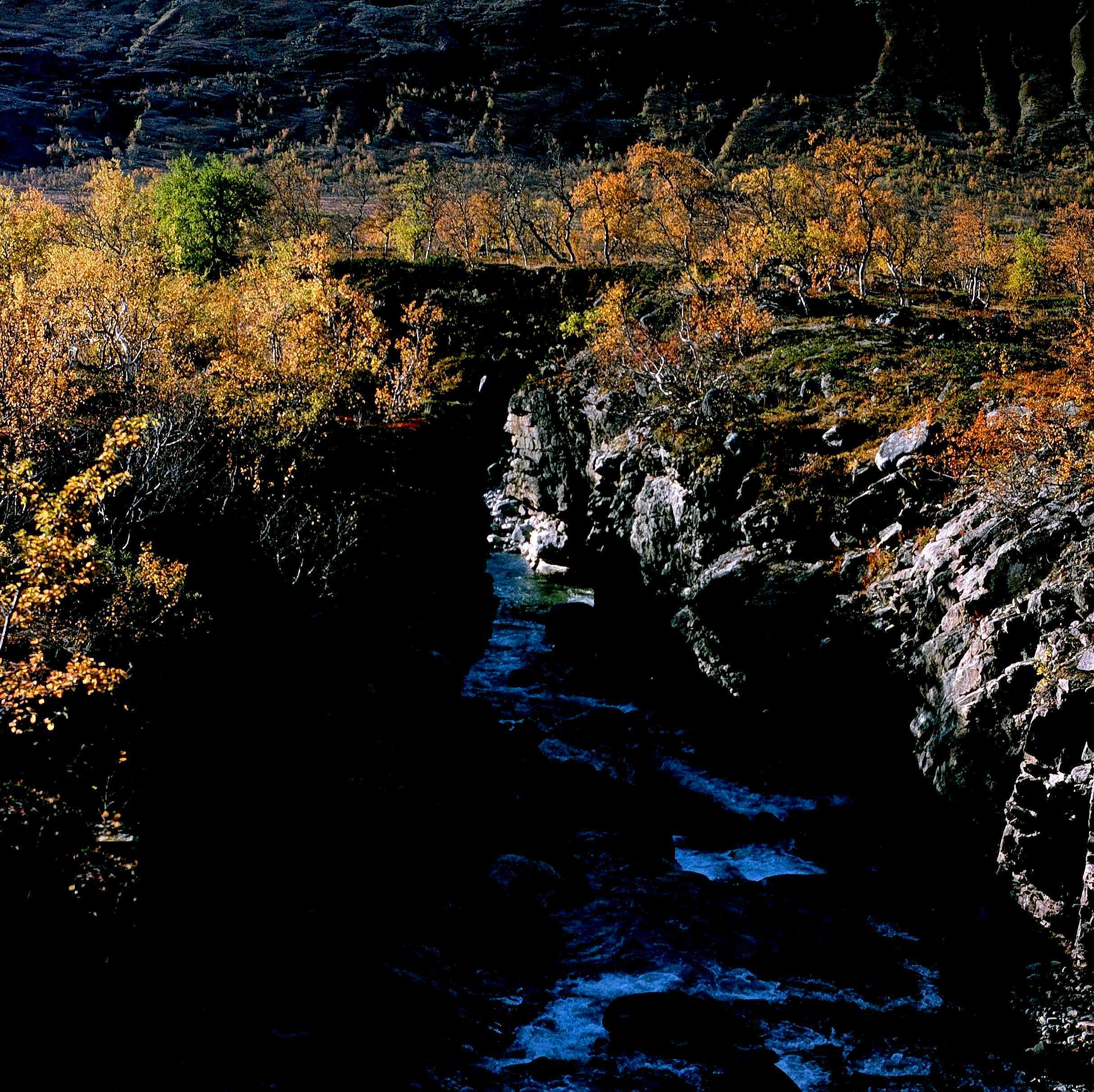 A 'jokk' in the Kebnekaise area, Sweden.